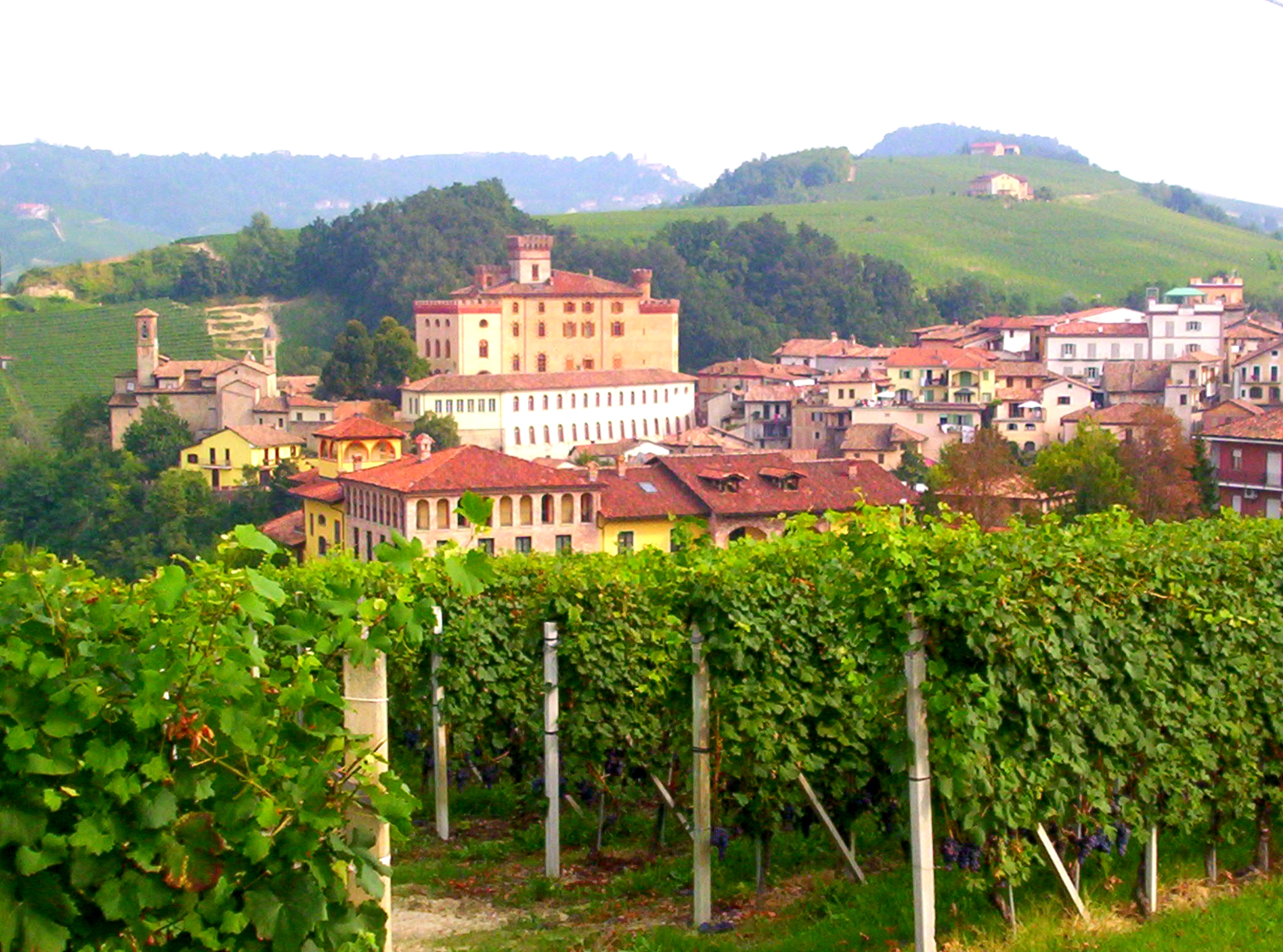 vista su Barolo (Cuneo)